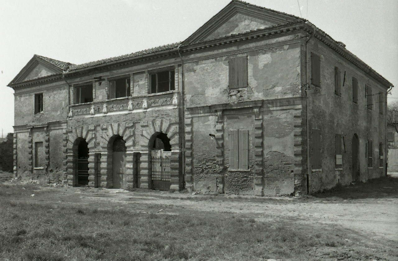 Servizio fotografico : Ferrara, 1969 / Paolo Monti. - Strisce: 7, Fotogrammi complessivi: 37 : Negativo b/n, gelatina bromuro d'argento/ pellicola ; 35 mm. - ((I fotogrammi hanno una doppia numerazione. . - Sul portanegativi: Nikon FP4. - Occasione: Documentazione per la pubblicaizone di: "Renzo RENZI (a cura di), Ferrara, Bologna, Edizioni Alfa, 1969". - Fonte: Agenda di Paolo Monti: Monti/ 3 aprile 1966 - 9 marzo 1971/ 12421-16823 (1966-1971), presso Archivio Paolo Monti. - Fonte: Monografia di Renzi, Renzo: Ferrara, Bologna, Edizioni Alfa (1969). - Fonte: Agenda di Paolo Monti: Monti - Agenda 1969 (1969), presso Archivio Paolo Monti